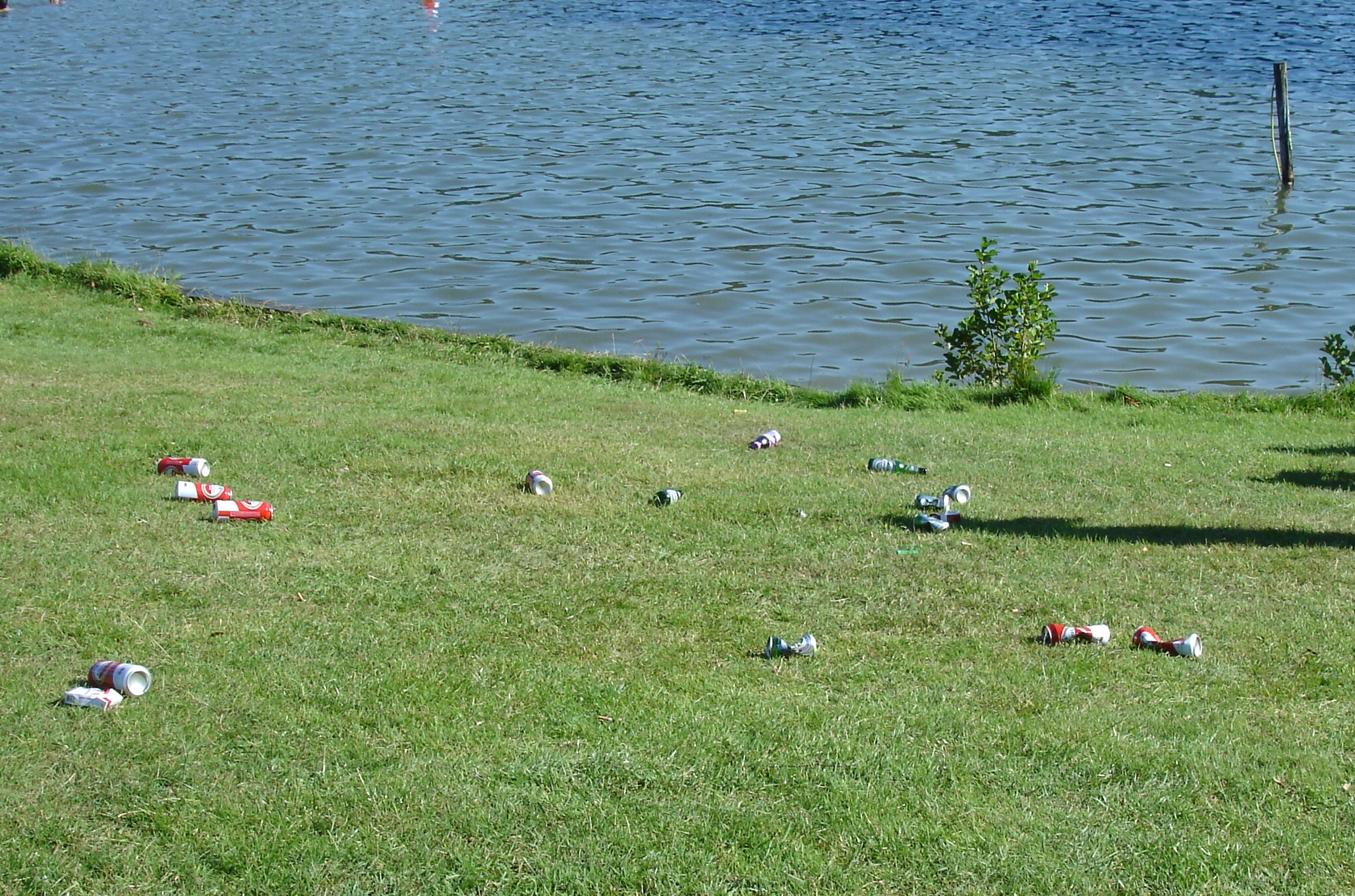 Bosvarken